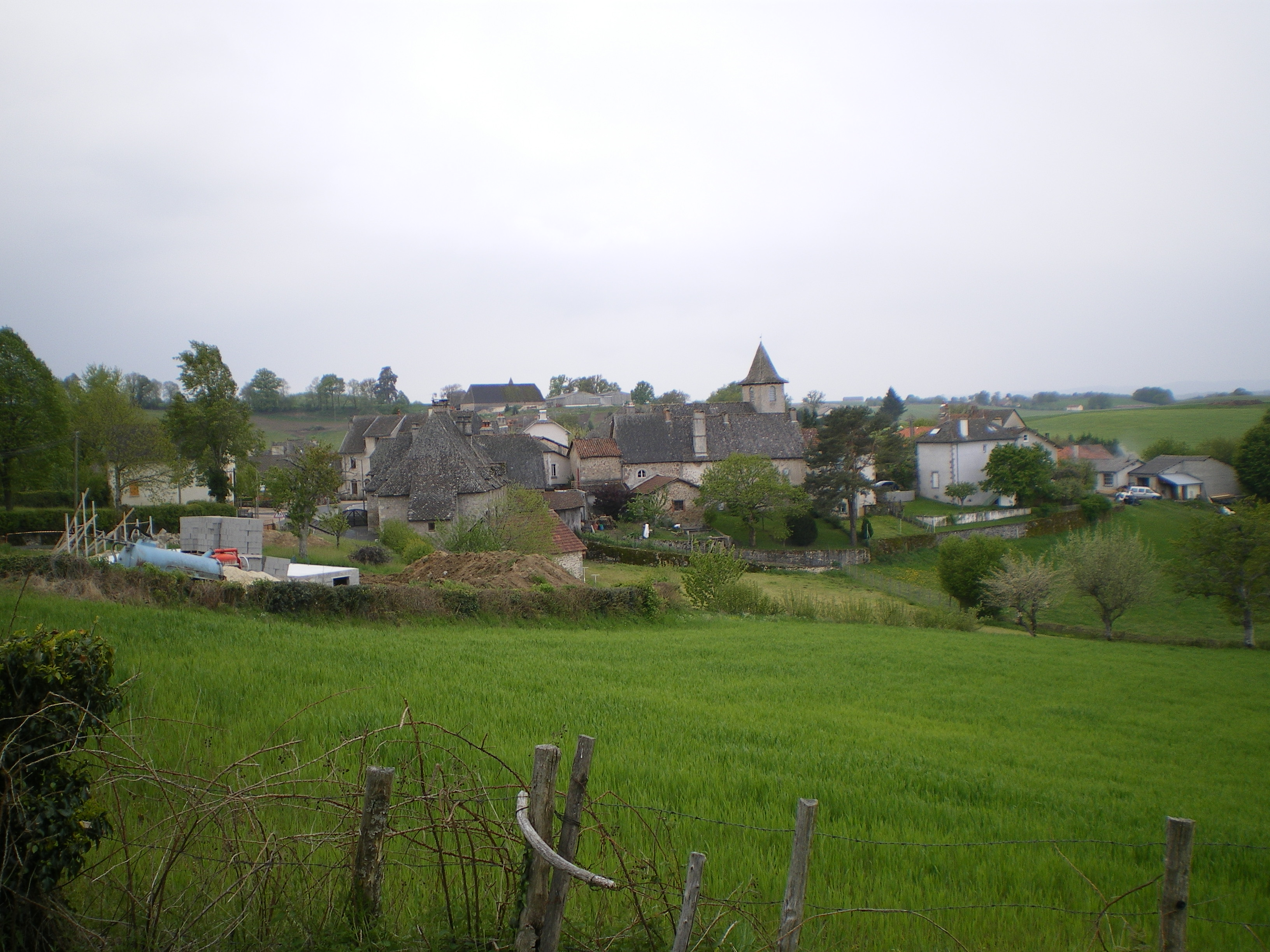 Omps, Cantal, France